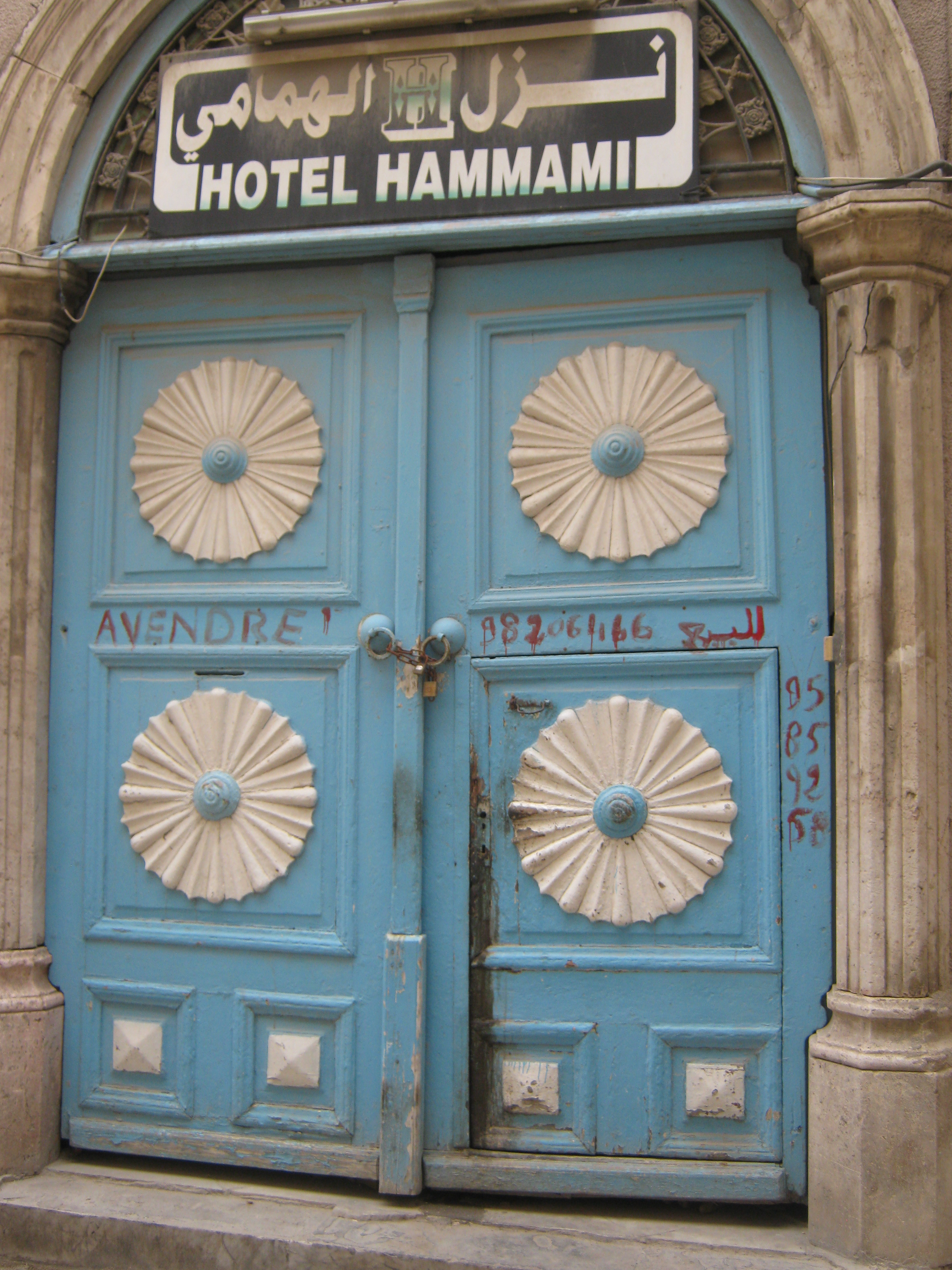 Palais Nessim Samama à Tunis